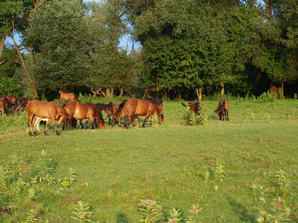 Konji u Nacionalnom parku Lonjsko Polje.